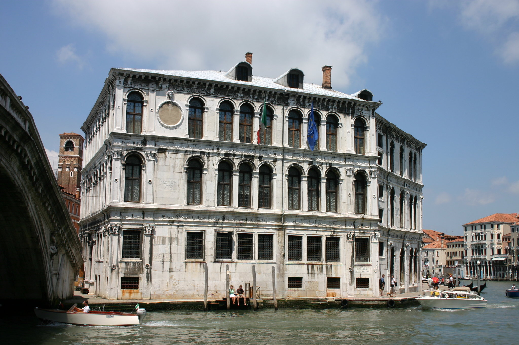 Palazzo dei Camerlenghi a Rialto. Foto scattata da me il 30.6.05. Fotocamera Canon Eos 300D 6,0 mp.